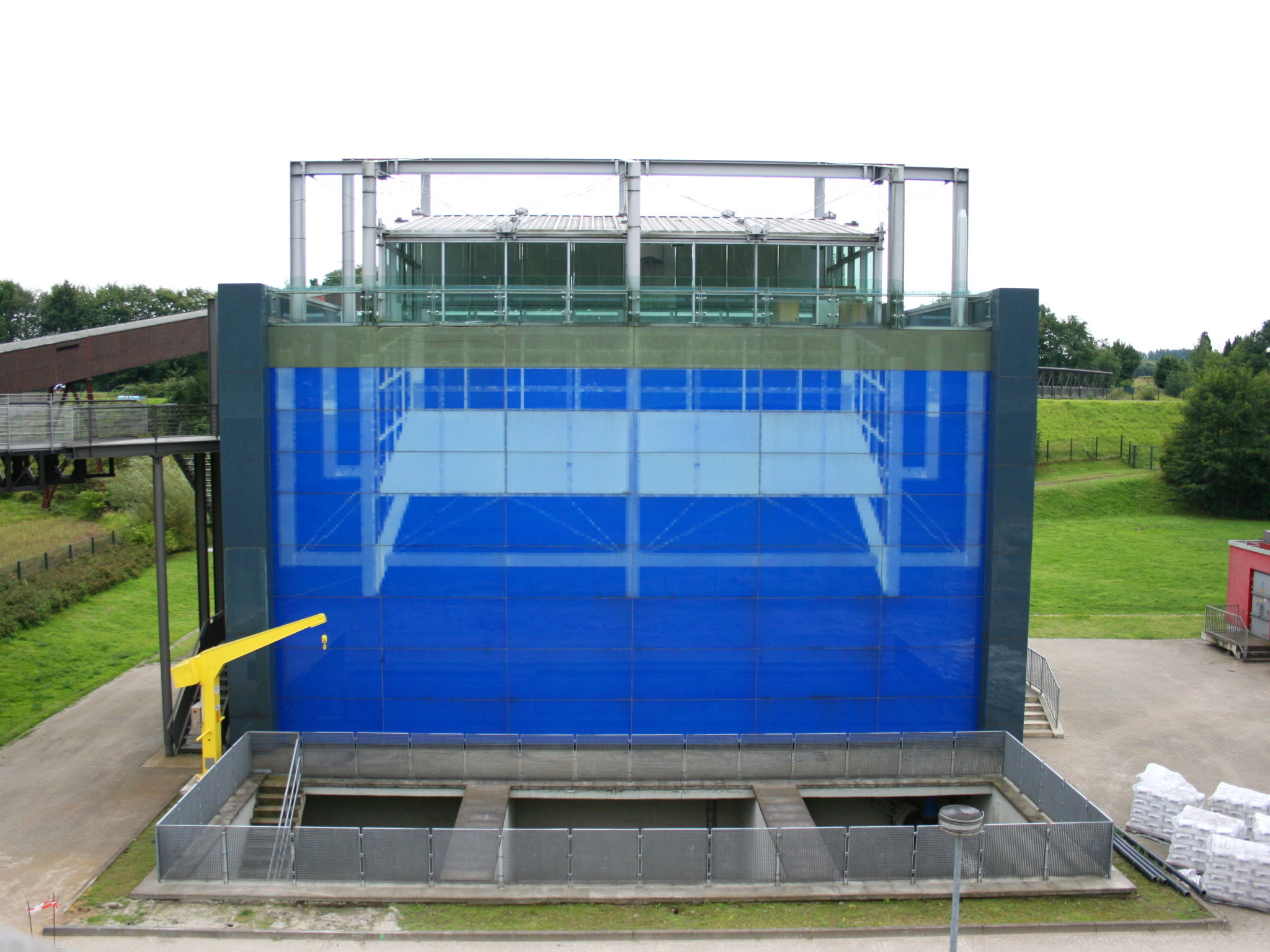 Pumpwerk Horst im Nordsternpark in Gelsenkirchen